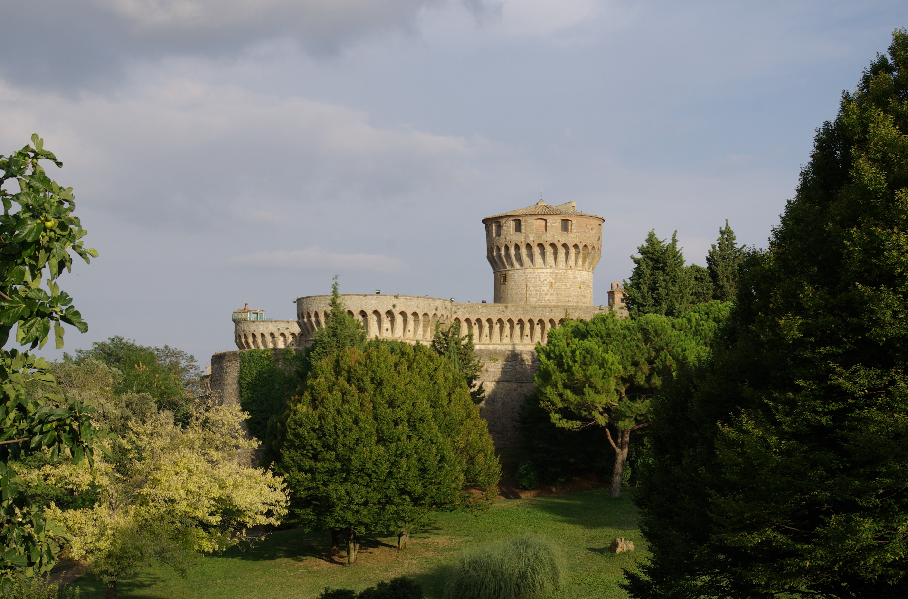 Fortezza Medicea in Volterra